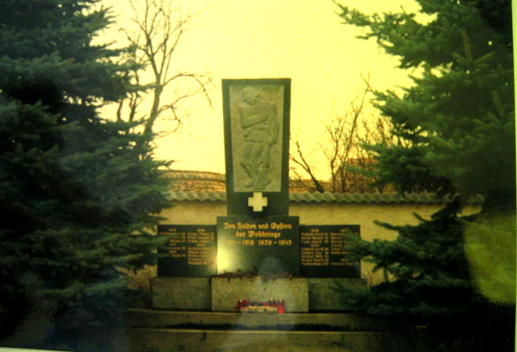 Kriegerdenkmal zum Gedenken der Helden und Opfer der beiden Weltkriege in Grafensulz